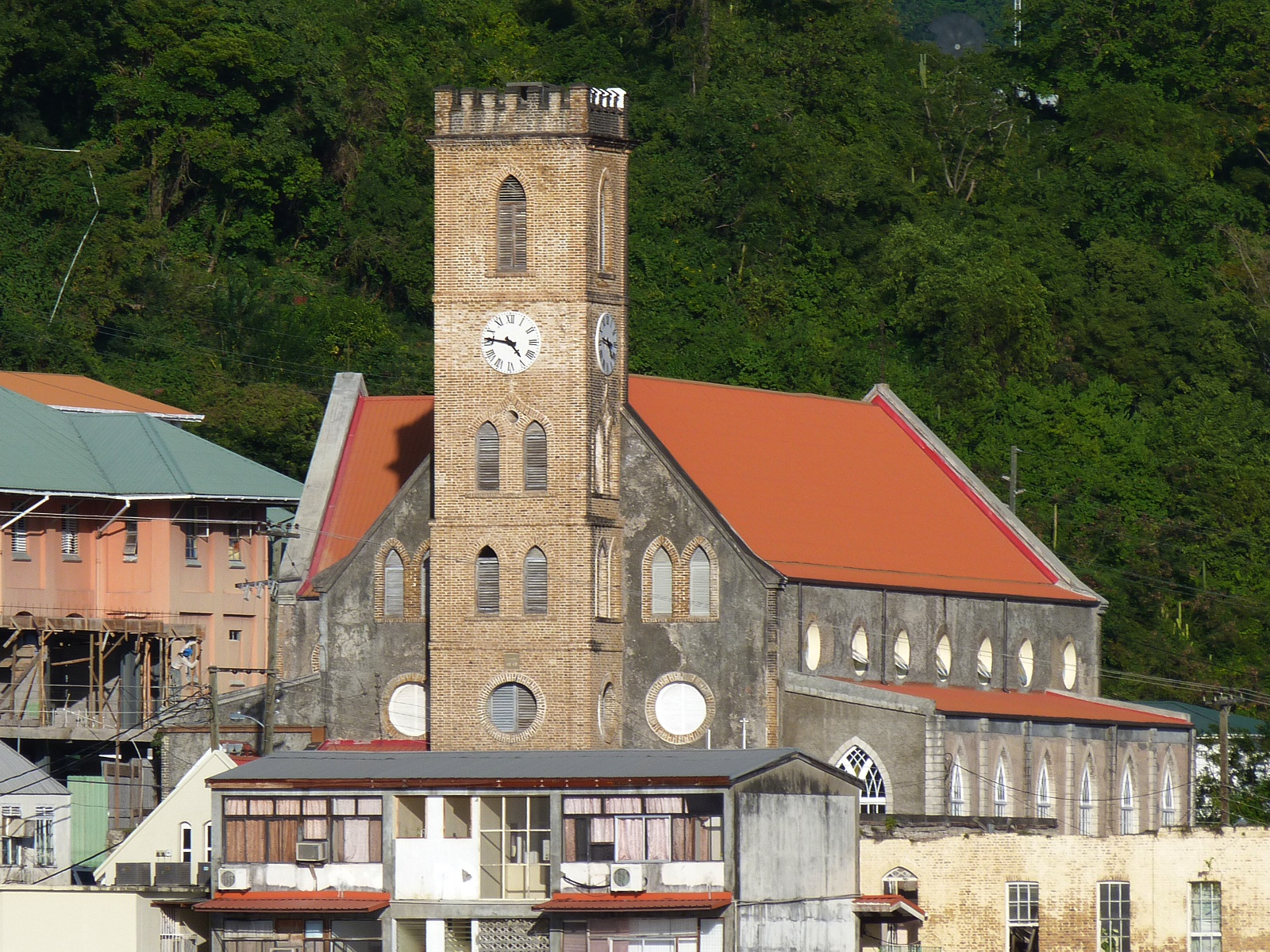 Die Cathedral of the Immaculate Conception in St. George's auf Grenada, deren Dach nach dem Hurricane von 2004 komplett erneuert wurde.